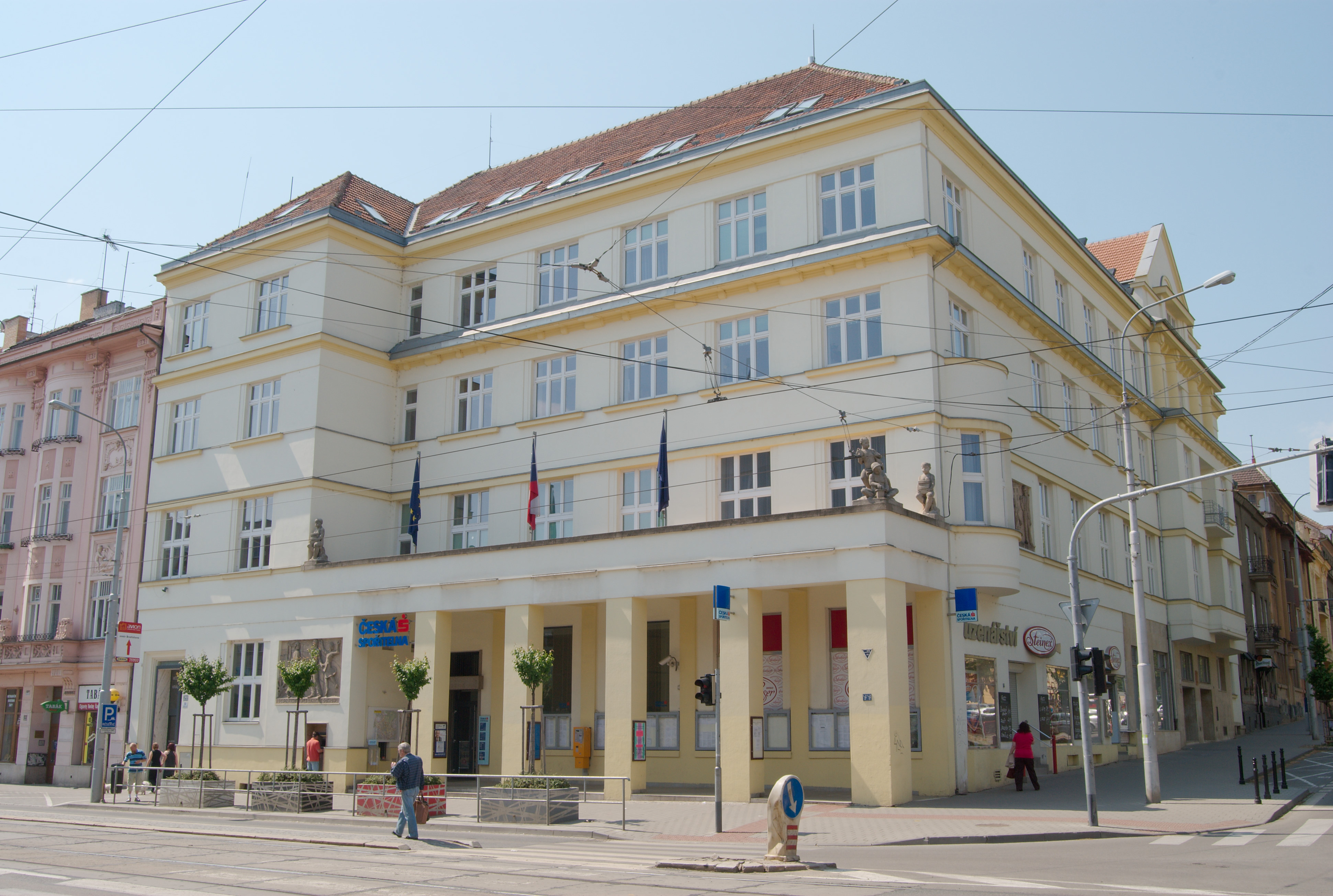 Radnice m.č. Brno-Královo Pole, Palackého třída 1365/59.